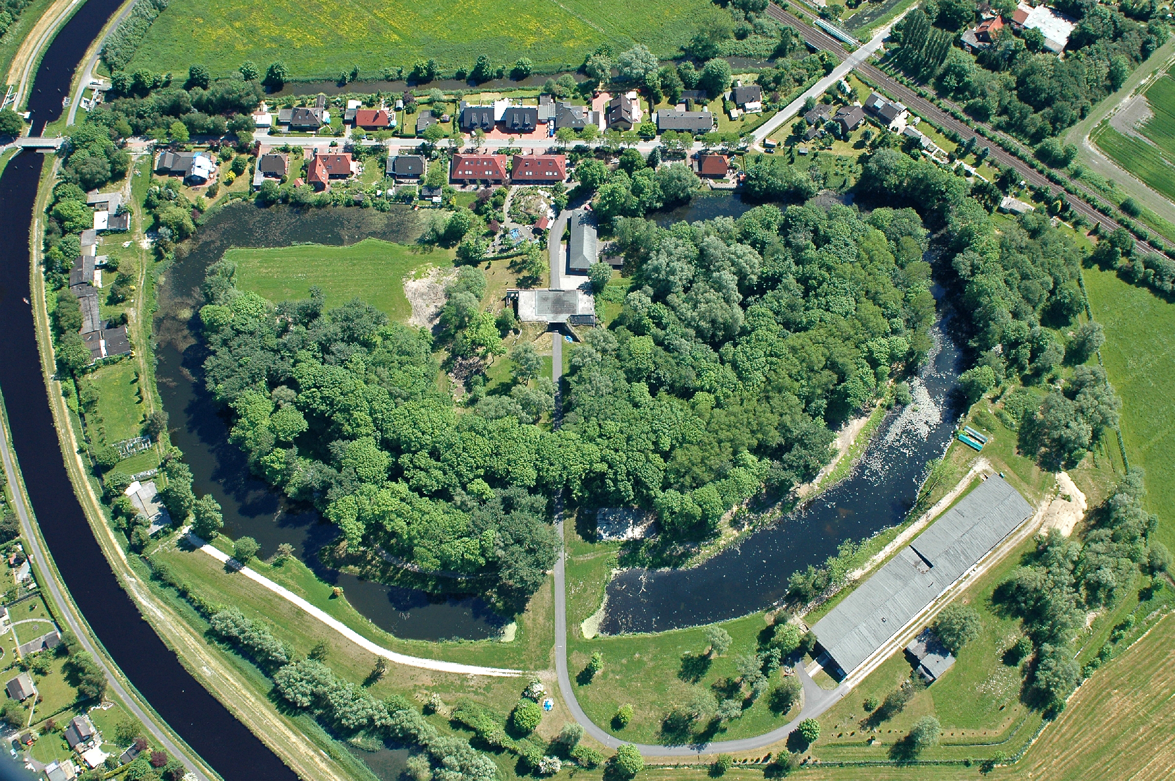 Fotoflug vom Flugplatz Nordholz-Spieka über Cuxhaven und Wilhelmshaven